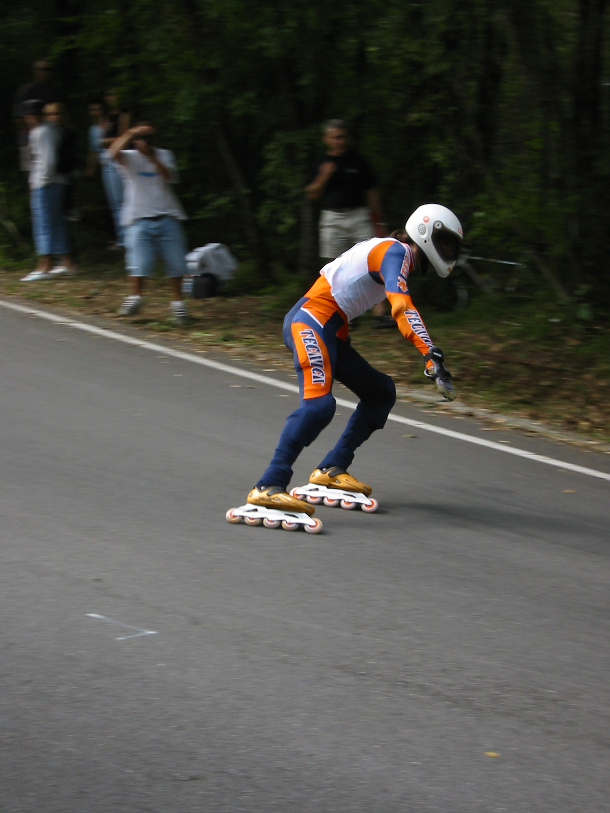 Inlinedownhill